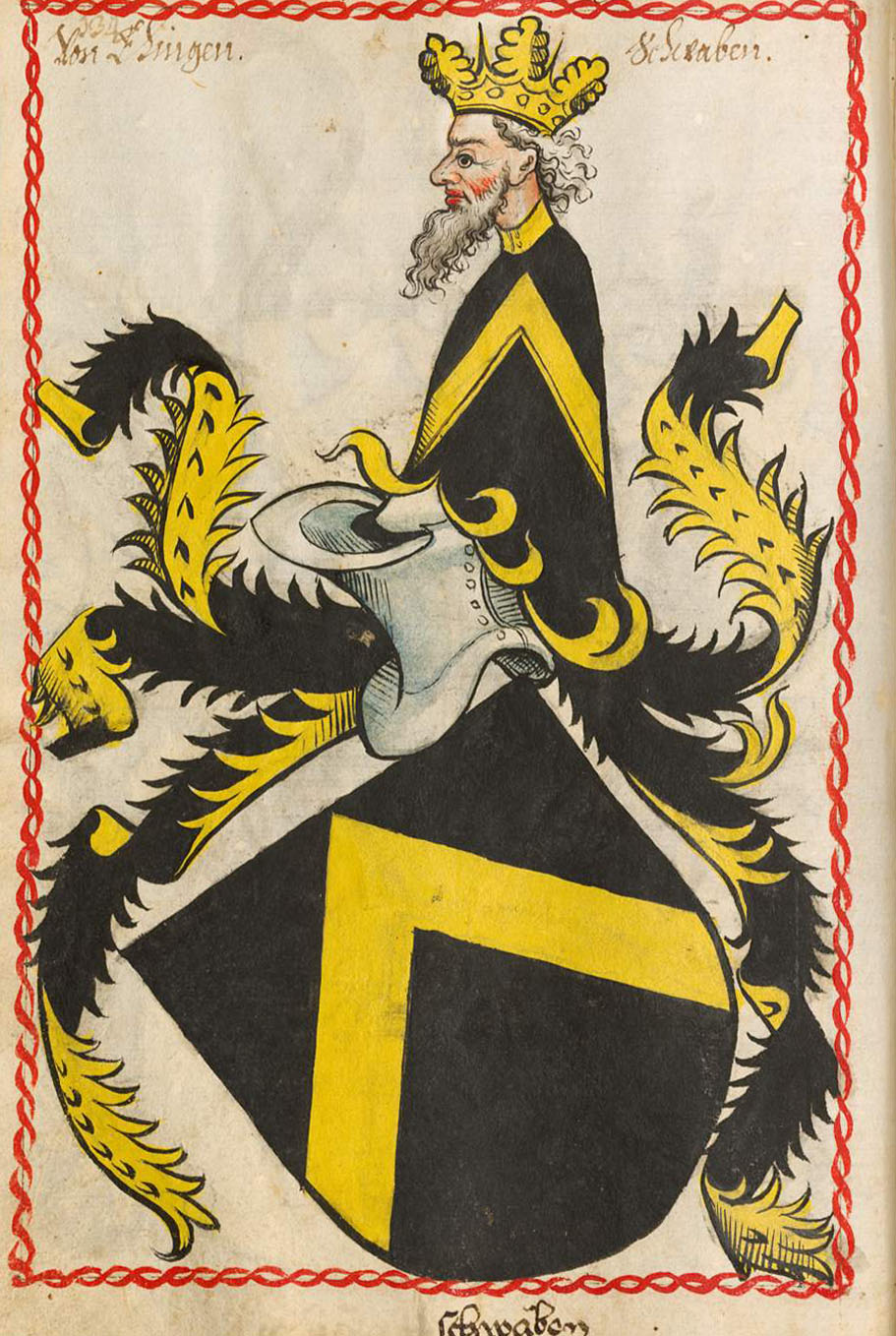 Scheibler'sches Wappenbuch, älterer Teil - Ehingen